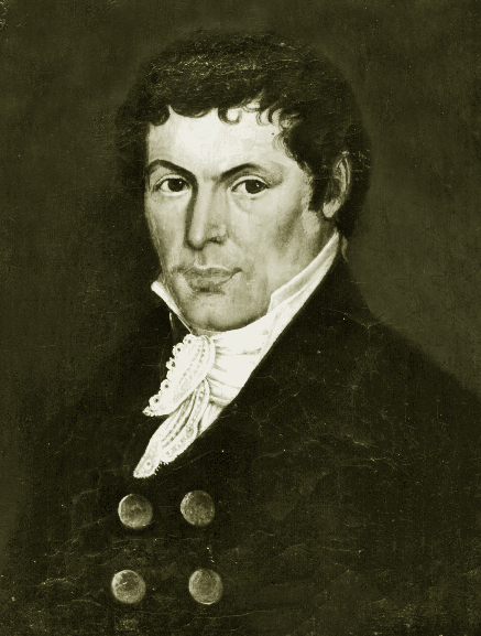 Jakob Kühnhaus (1782-1844), Bürgermeister in Mönchengladbach